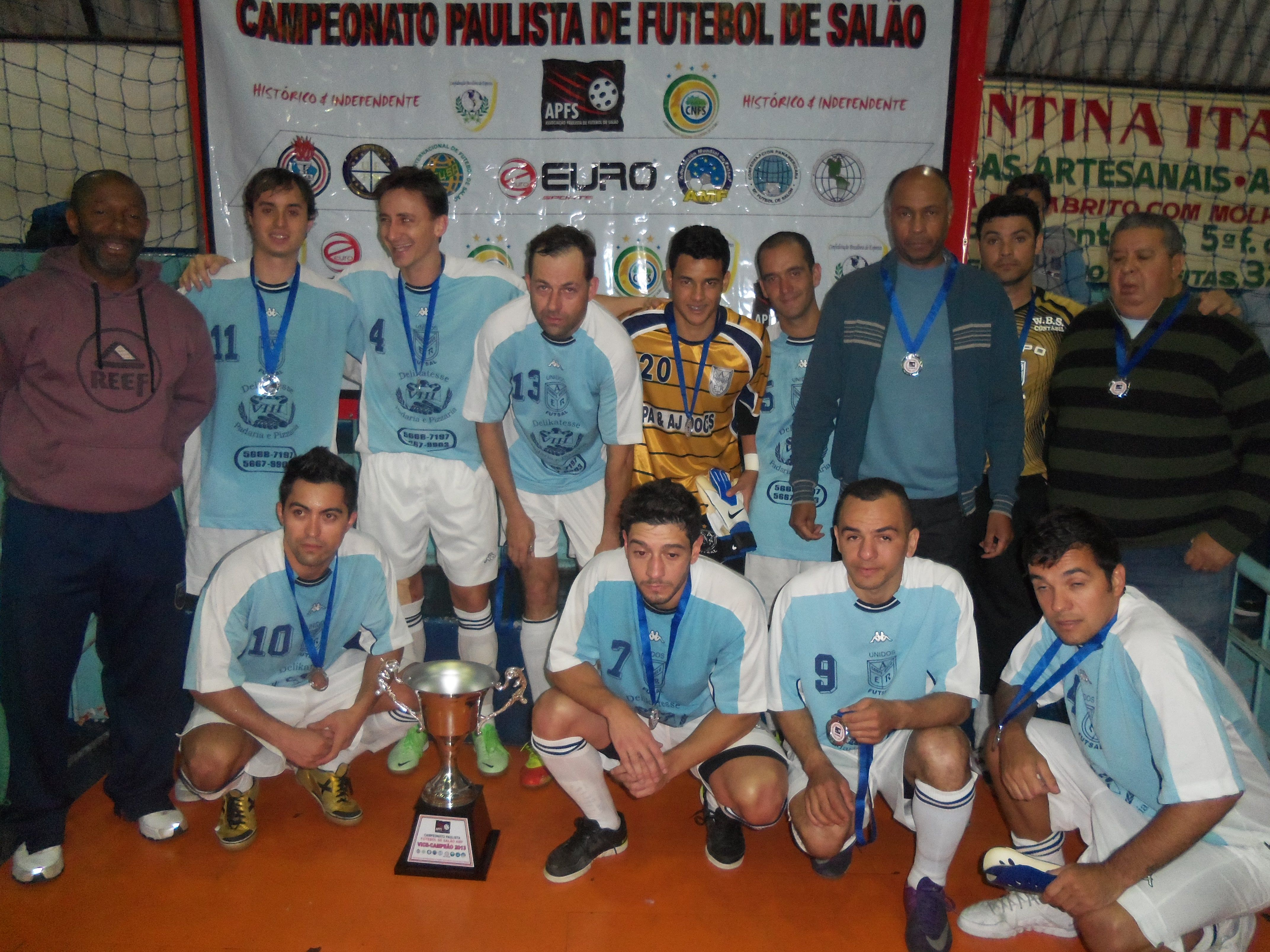 Campo Belo, equipe de futebol de salão AMF. Vice-campeã paulista em 2013.